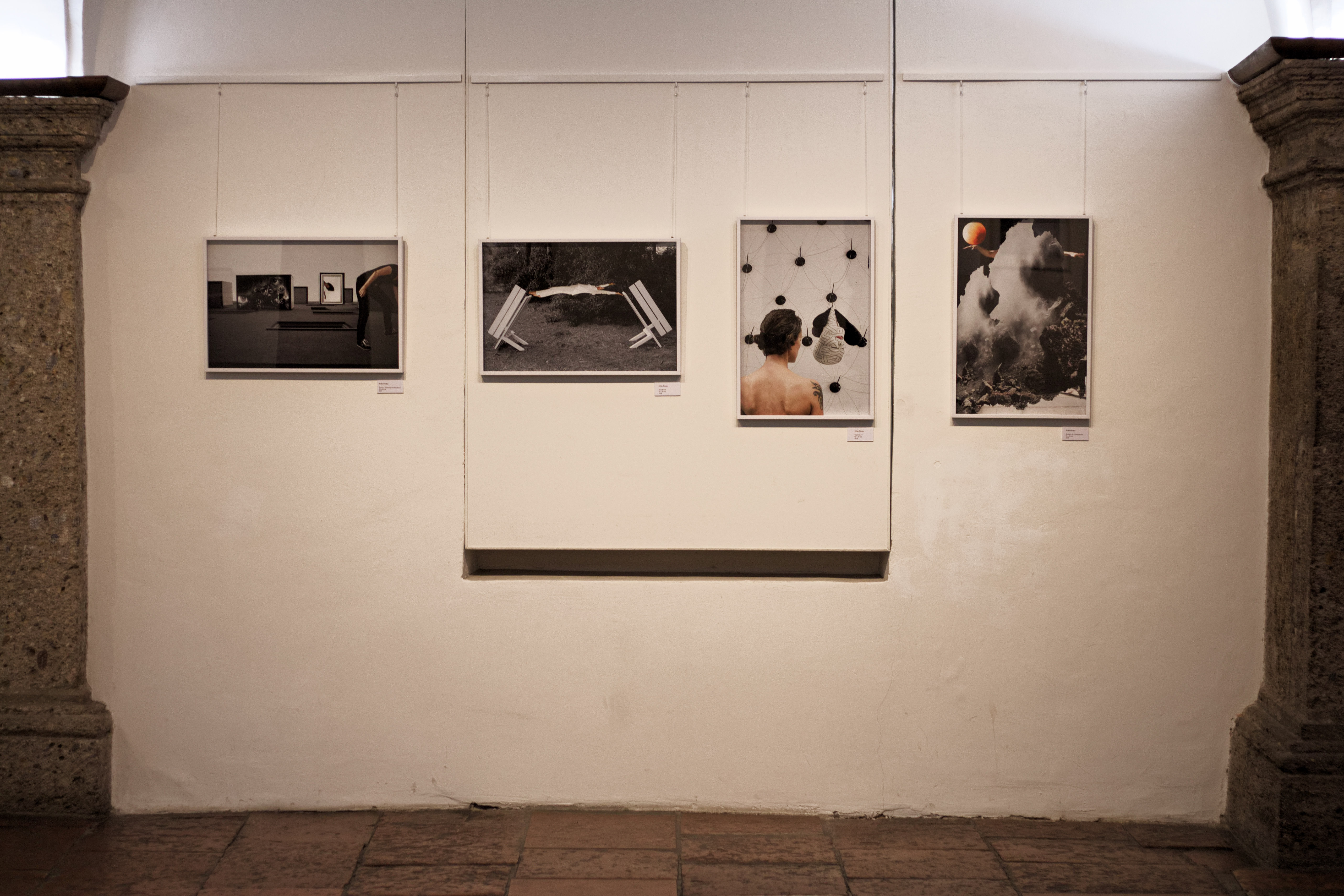 Im Salzburger Rathaus in der linken Altstadt befindet sich im 1. Stock eine Säulenhalle, in der als Teil der Stadtgalerie Salzburg wechselnde Ausstellungen frei zugänglich sind. Das Bild vom Februar 2019 zeigt eine Ausstellung der in Salzburg arbeitenden Sozialwissenschaftlerin und Fotografin Erika Pircher.